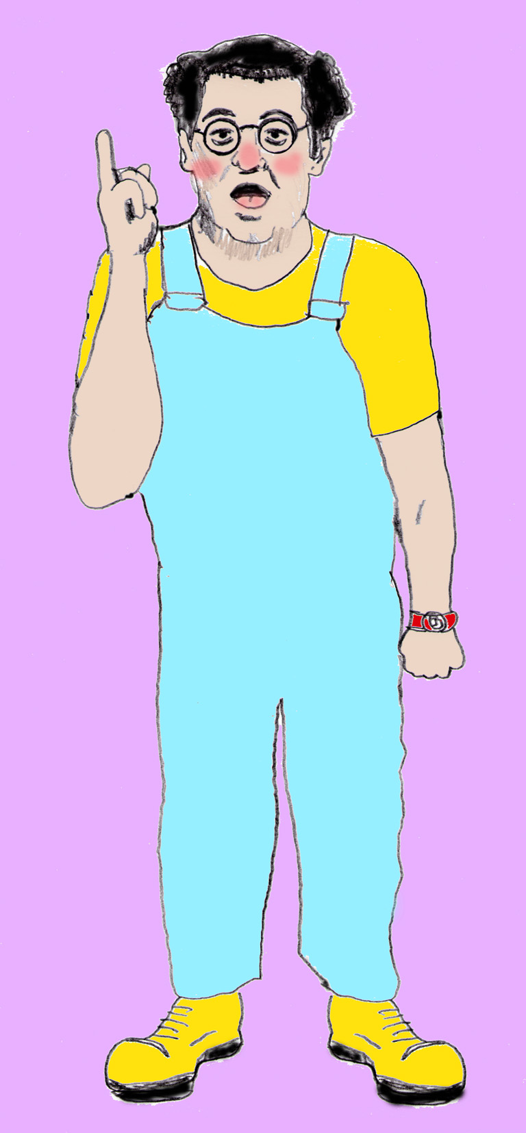 Dessin original représentant l'humoriste Coluche durant les années 1970